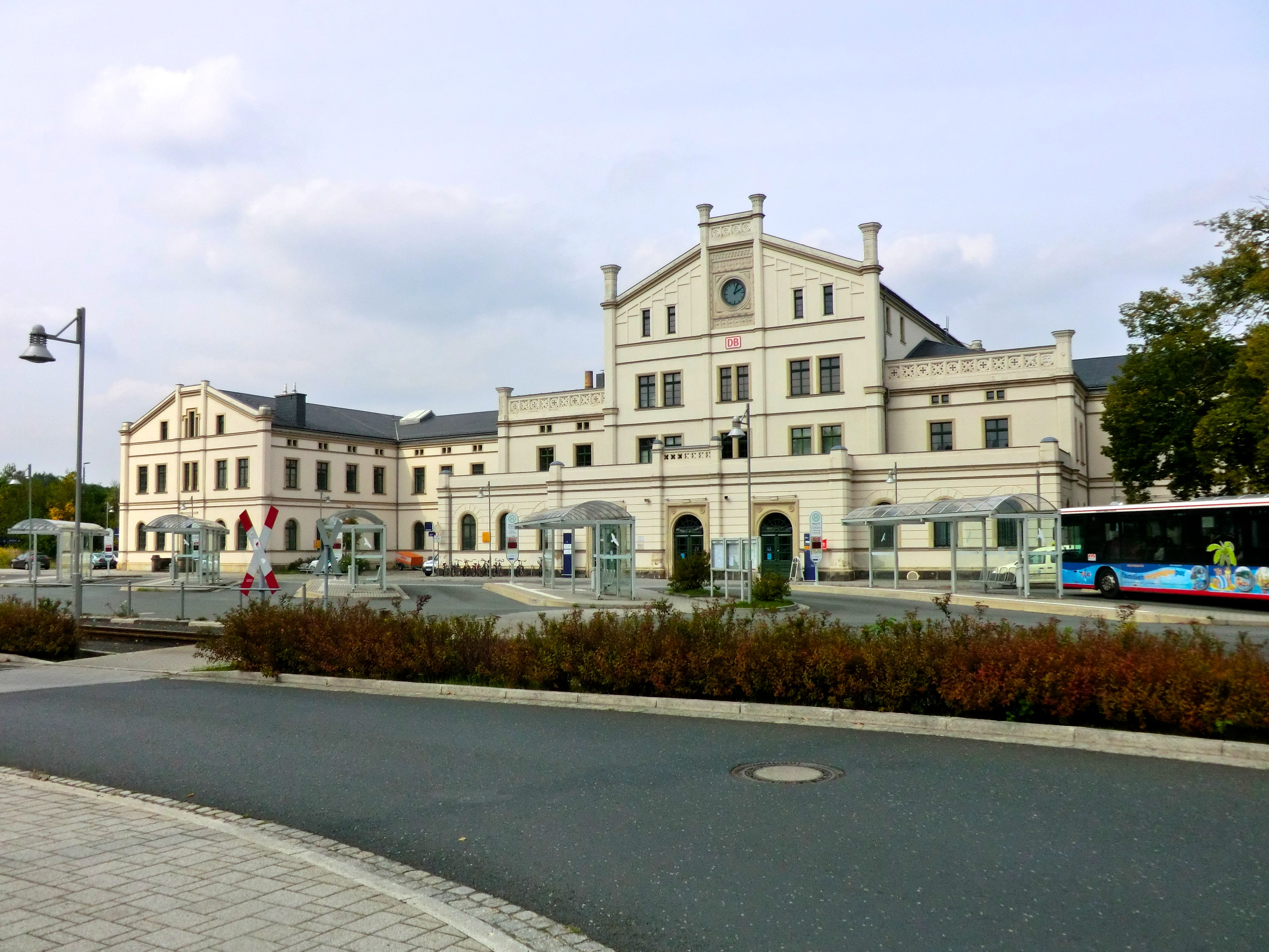 Hauptbahnhof Zittau